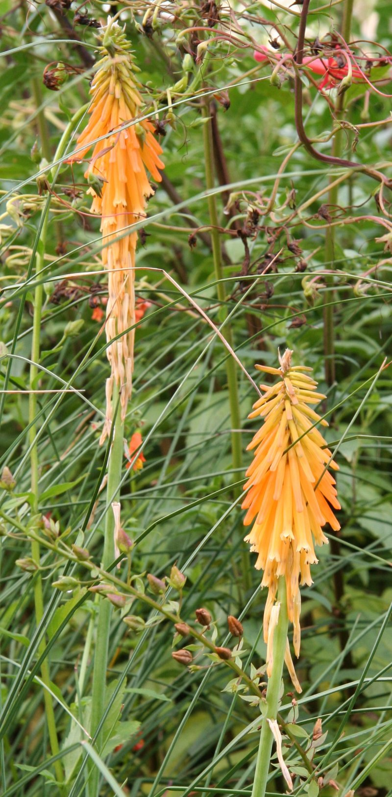 Kniphofia triangularis